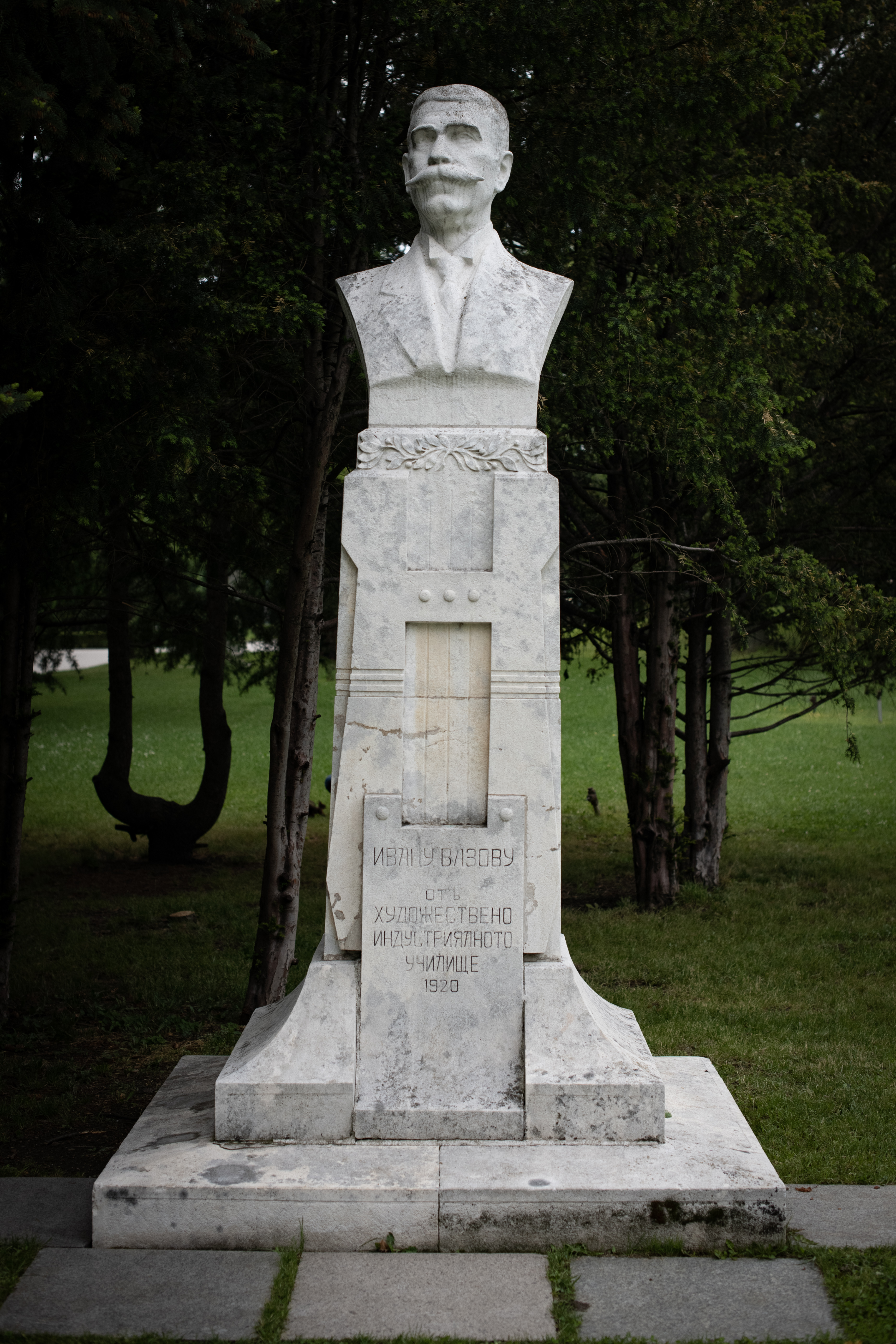 Снимката документира паметника на Иван Вазов в парка "Борисова градина".